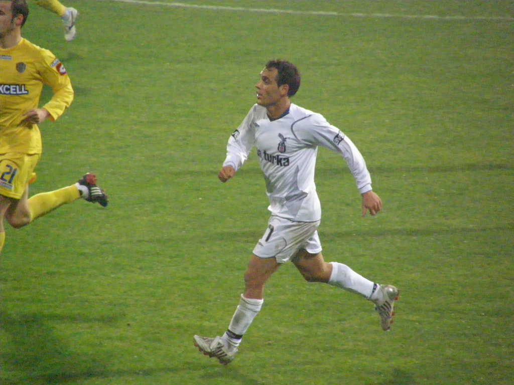 2008-2009 Sezonu Beşiktaş - Ankaragücü maçında